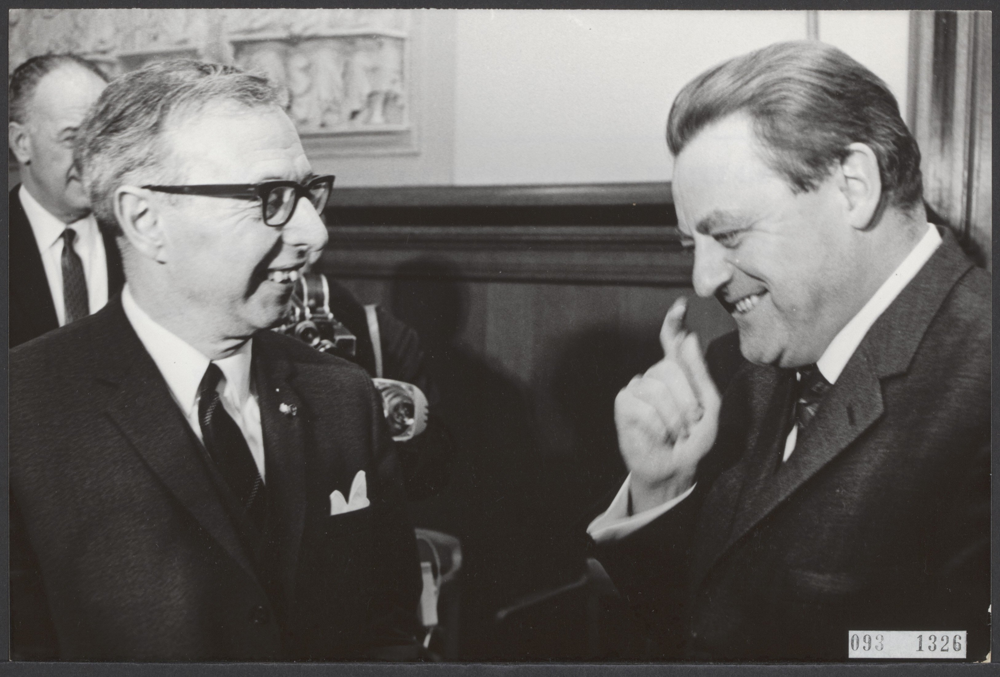 Collectie / Archief : Fotocollectie Elsevier Reportage / Serie : [ onbekend ] Beschrijving : vergaderingen, ministers, internationale samenwerking Datum : 16 januari 1967 Locatie : Den Haag, Zuid-Holland Trefwoorden : internationale samenwerking, ministers, vergaderingen Persoonsnaam : Strauss, Franz-Josef, Zijlstra, Jelle Instellingsnaam : EEG, Vredespaleis Fotograaf : Koch, Eric / Anefo Auteursrechthebbende : Nationaal Archief Materiaalsoort : Foto (zwart/wit) Nummer archiefinventaris : bekijk toegang 2.24.05.02 Bestanddeelnummer : 093-1326